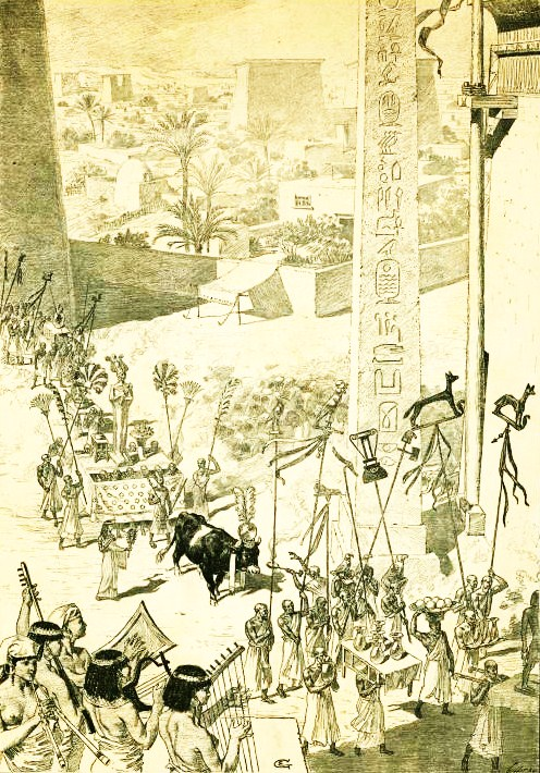 Représentation de la version (imaginaire) égyptienne de la procession parisienne du Bœuf Gras.